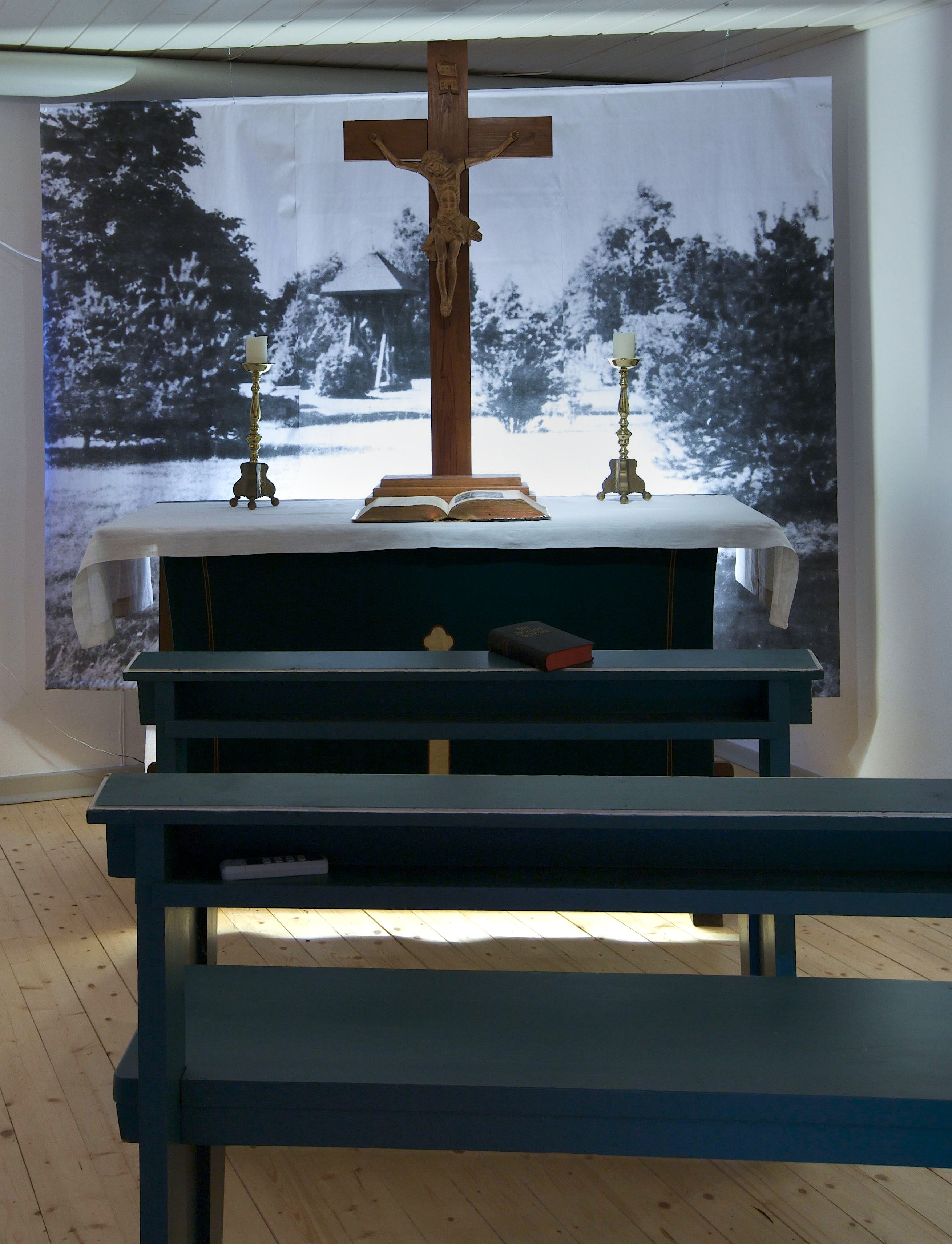 Gedenkraum in der Gedenkstätte Baracke Wilhelmine in Schwanewede-Neuenkirchen in Niedersachsen/Deutschland.